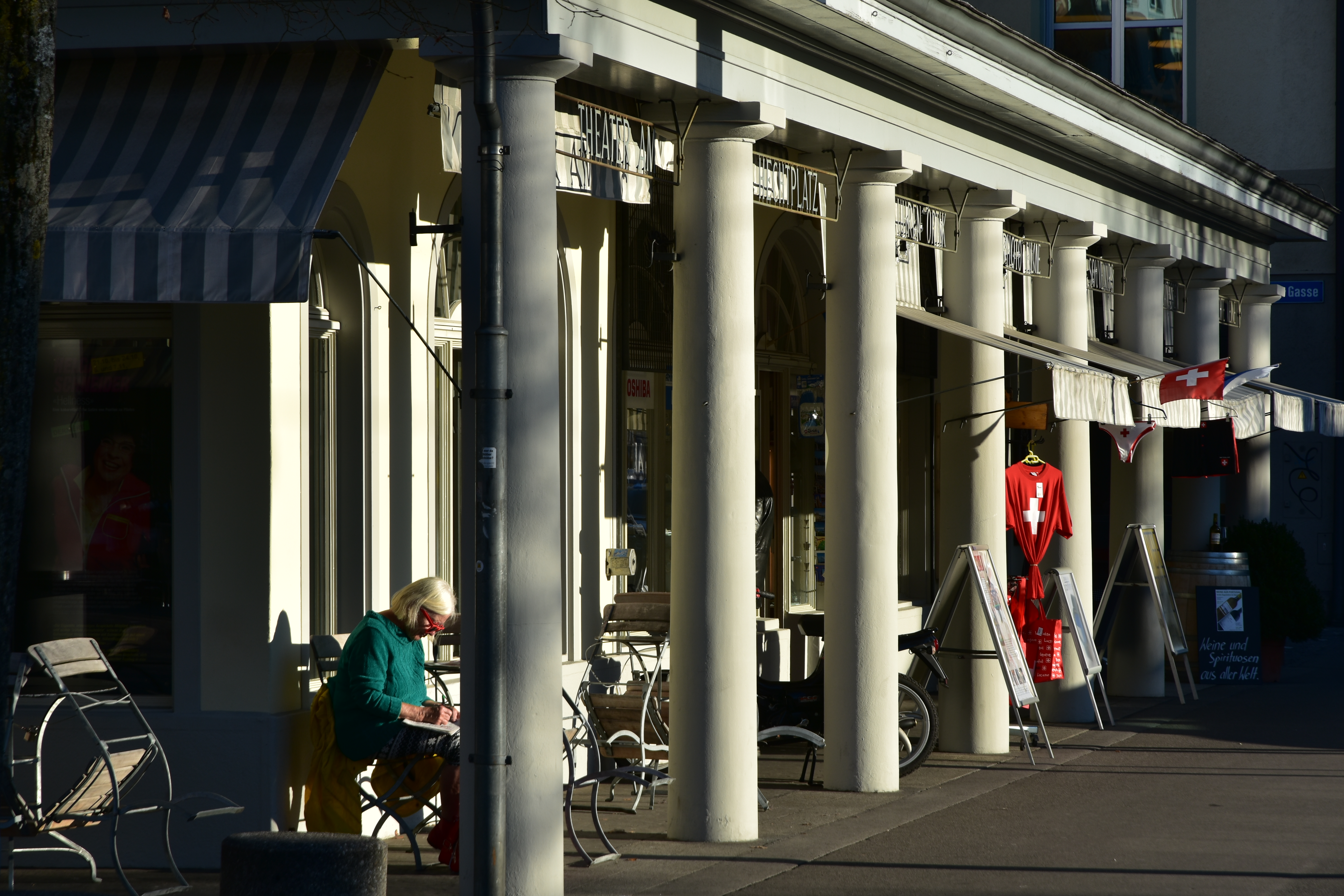 Theater am Hechtplatz respectively Zürcher Märchenbühne, Limmatquai in Zürich (Switzerland)